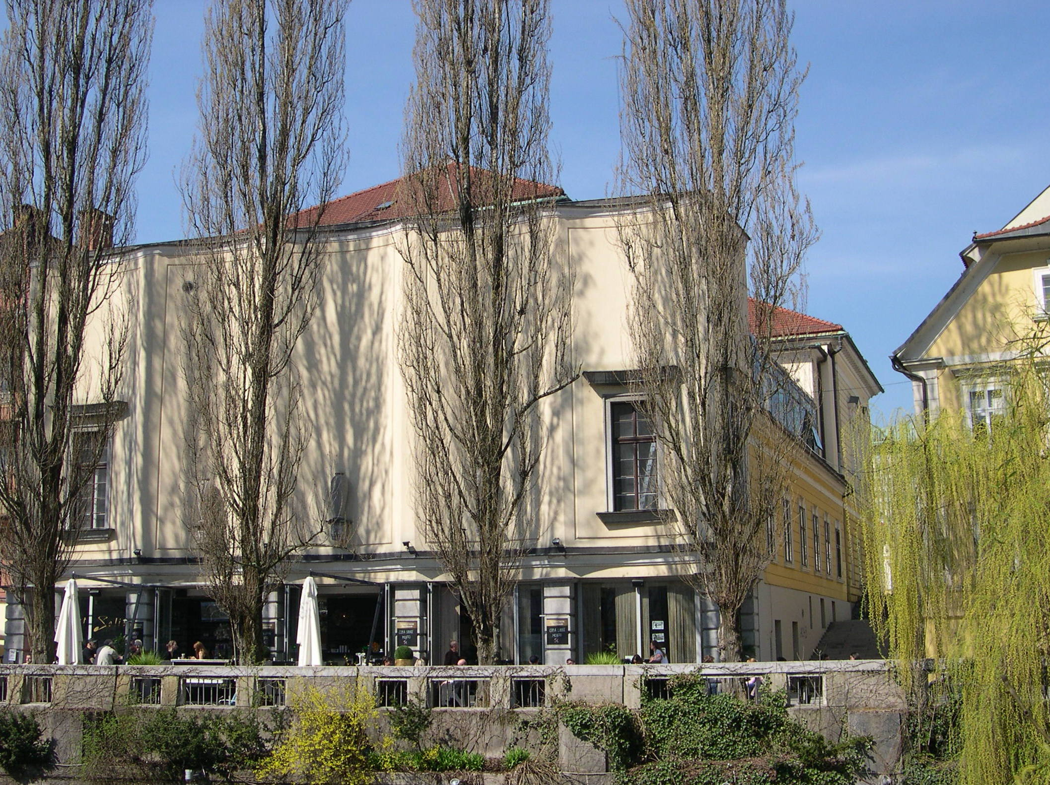 Zgradba Slovenske Filharmonije - Zadnja fasada